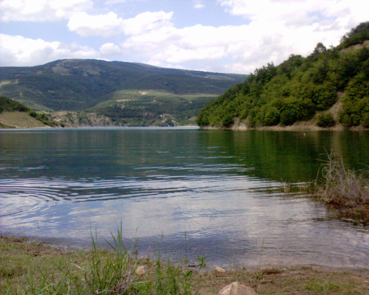 Zavojsko lake, near Pirot, Serbia/Le lac Zavojsko près de Pirot, Serbie